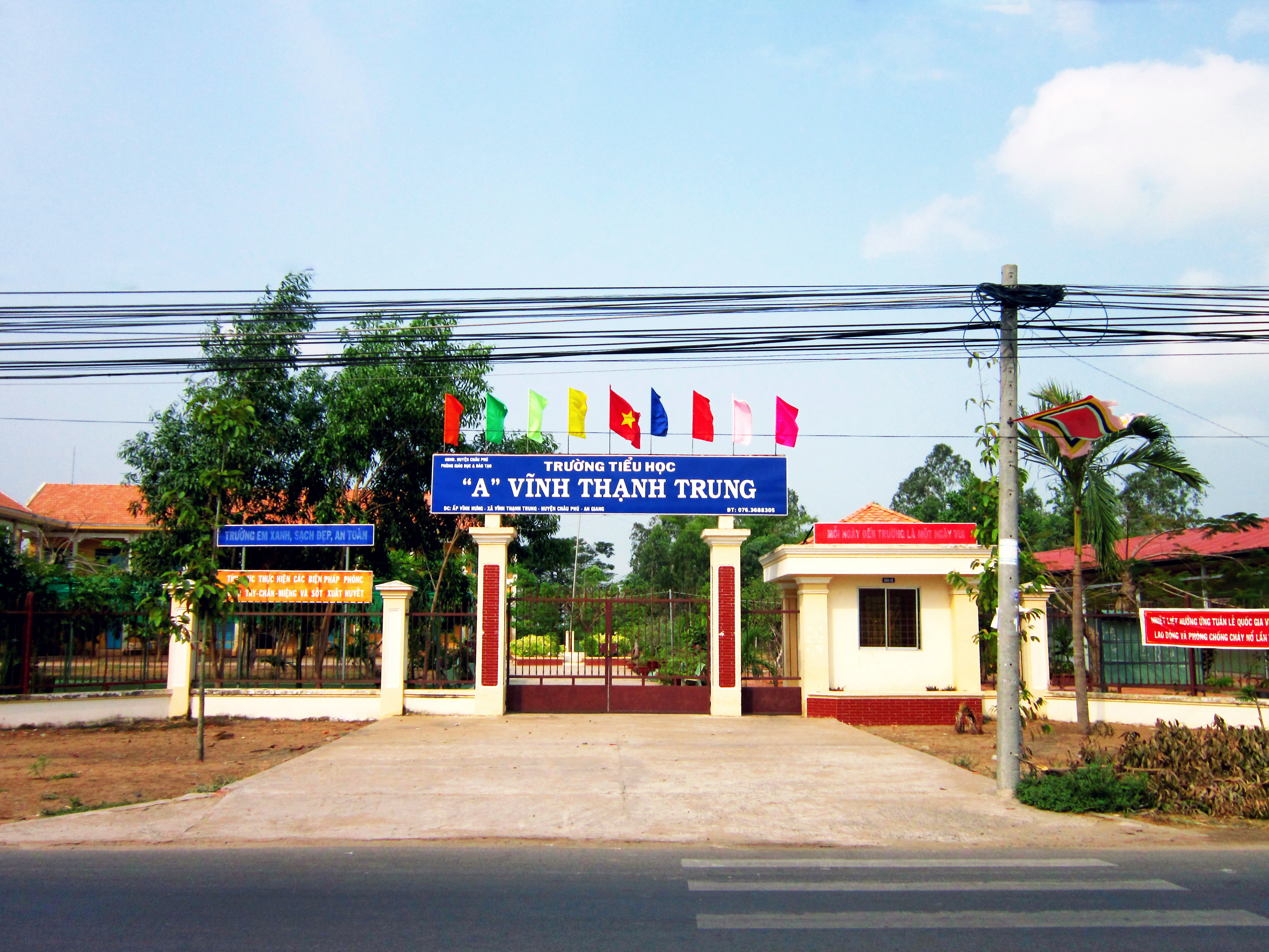 Trường Tiểu học A Vĩnh Thạnh Trung trên Quốc lộ 91, thuộc , huyện Châu Phú, tỉnh An Giang, Việt Nam.